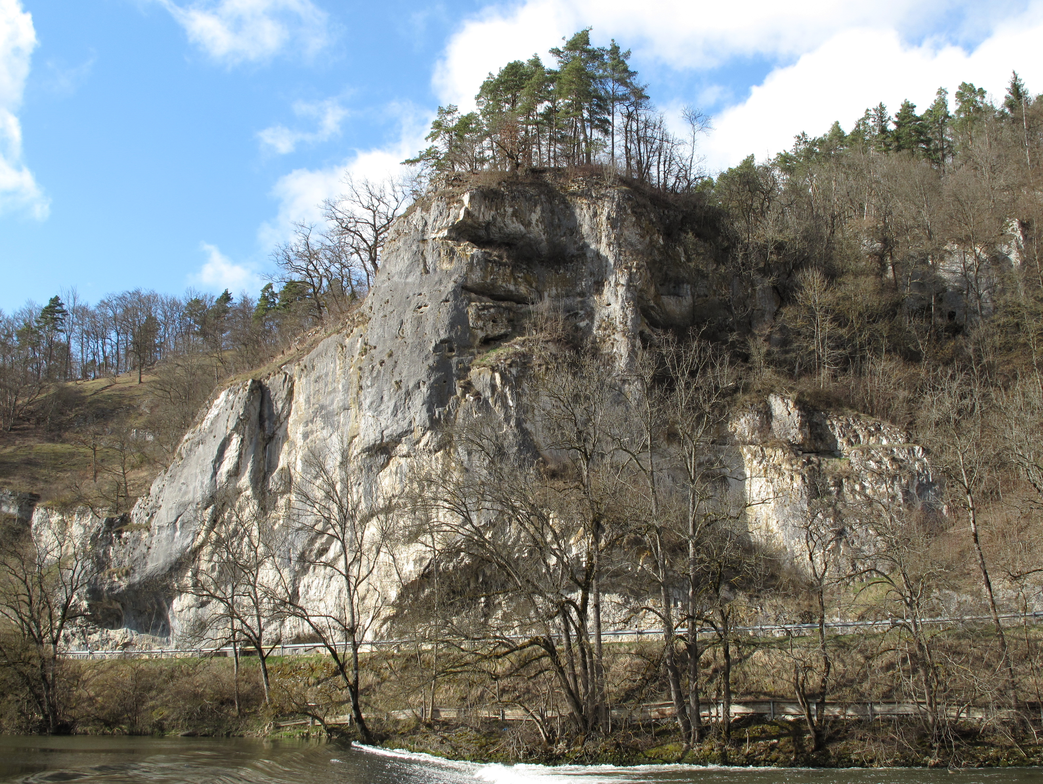 Der Burgfelsen der Ruine Altgutenstein aus Südosten.